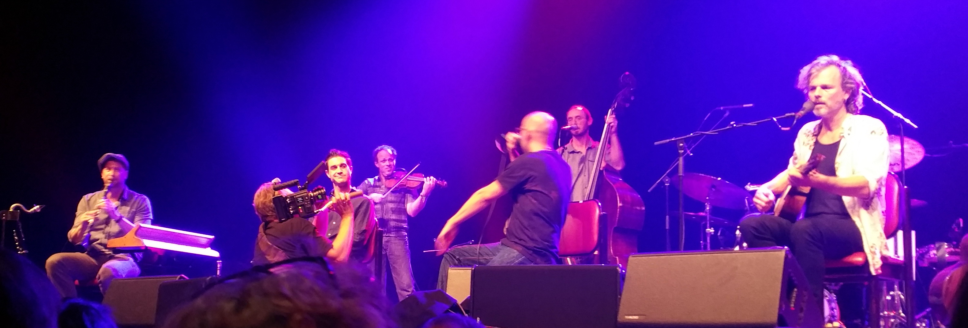 Dreiviertelblut am 3. Oktober 2018 im Zirkus Krone